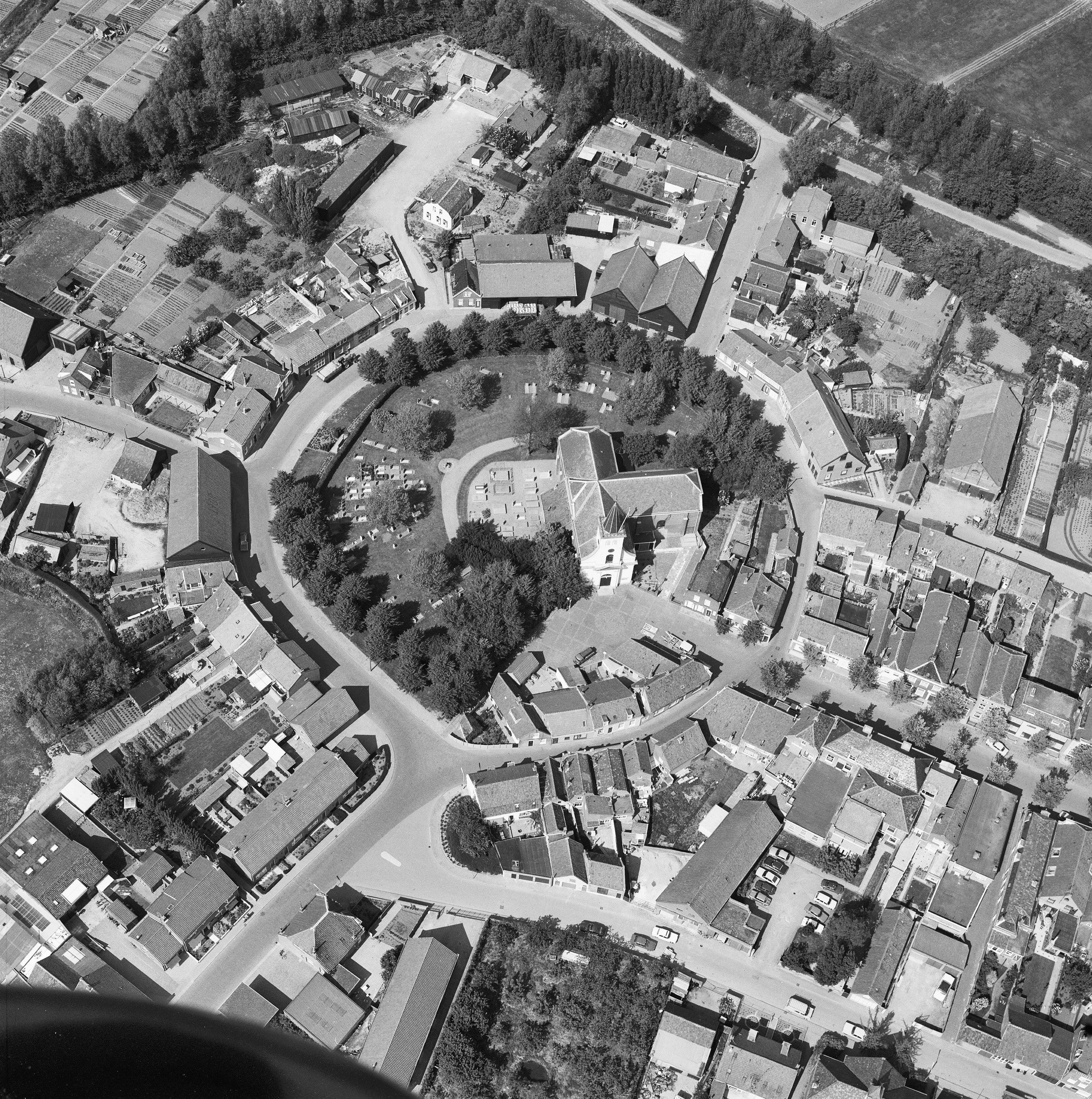 luchtfoto's